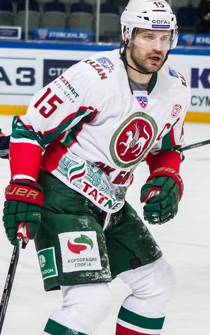 Нападающий казанского «Ак Барса» Александр Свитов во время матча чемпионата КХЛ против хабаровского «Амура» 14 ноября 2014 года.